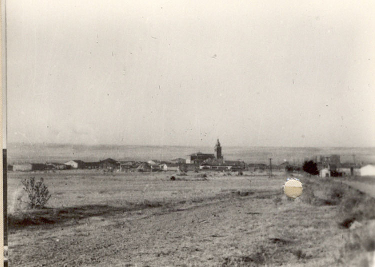 Vista panorámica - Serrada (Valladolid) - Colección de cromos álbum de Valladolid editado por la Caja de Ahorros Provincial en 1962. Paisaje castellano con Serrada al fondo. - Fotografía 60 x 42 B/N